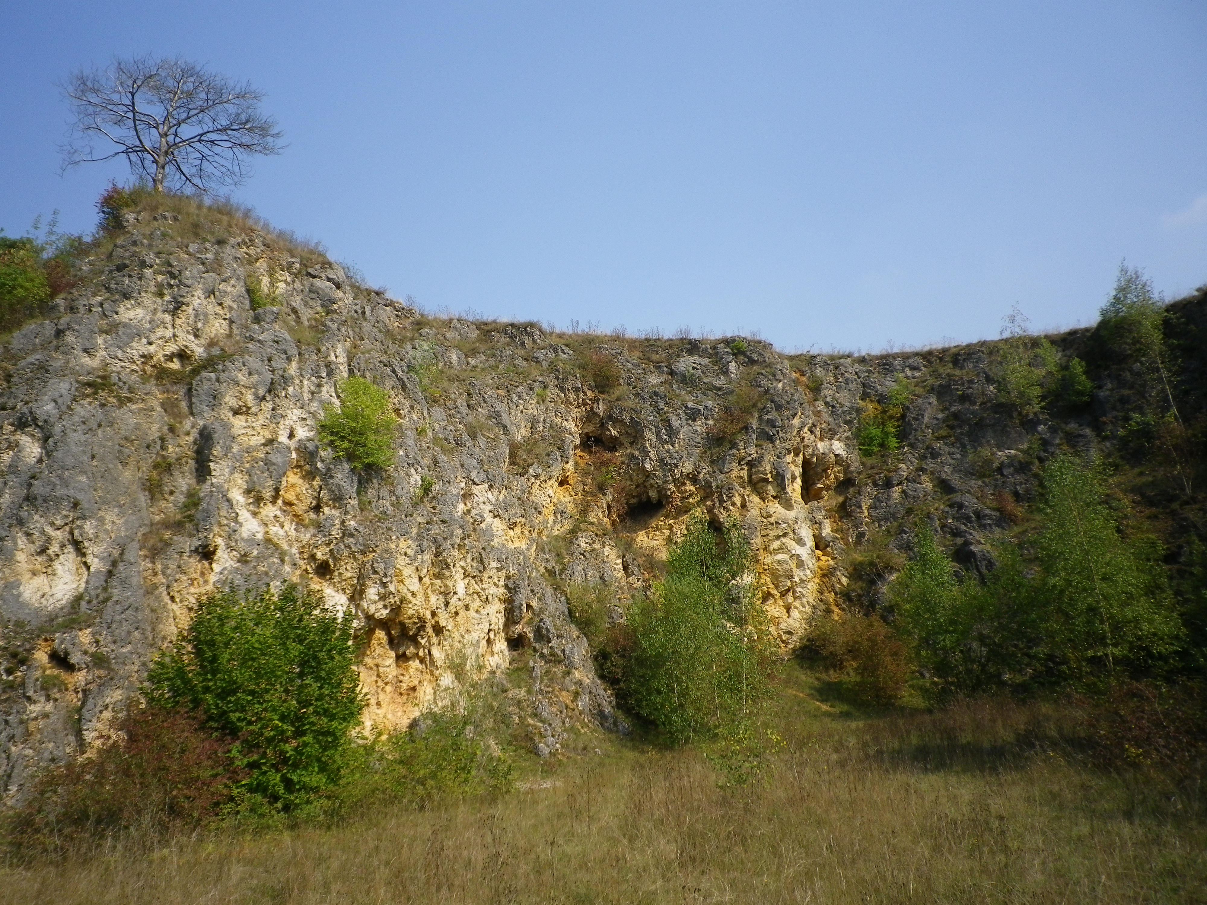 Steinbruch von Laisacker